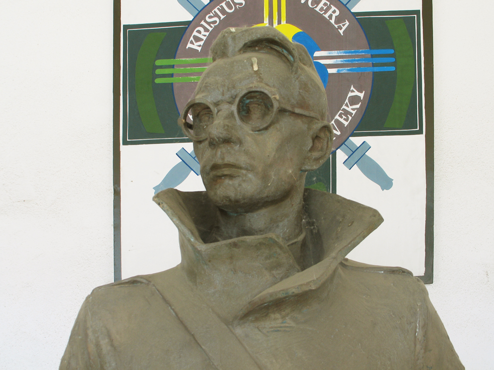 Bronzová busta kpt. Jána Nálepku